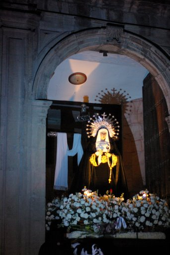 Imagen de María Stma. de la Soledad en su salida del templo.